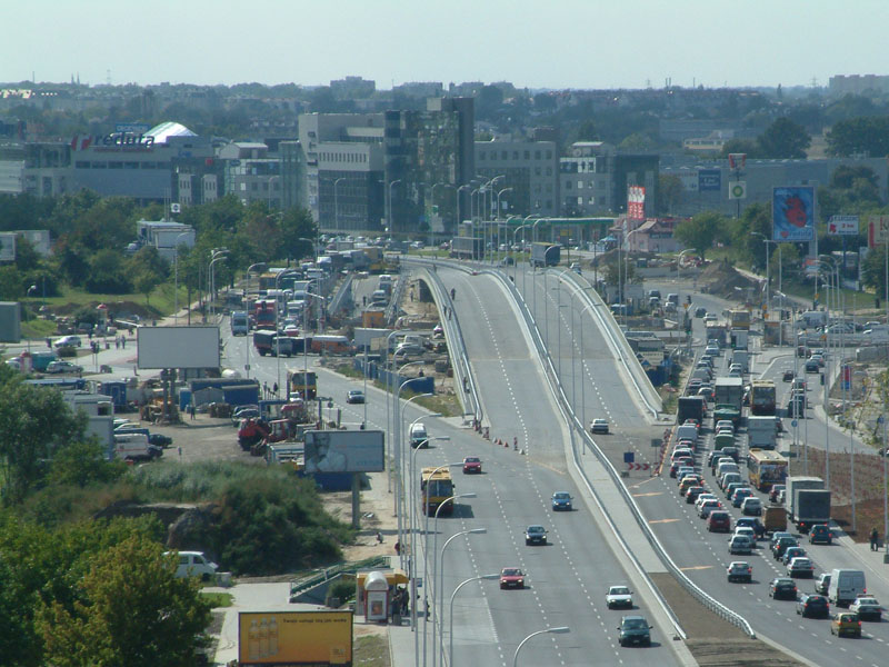 PL, Poland, Warsaw, Ochota, Aleje Jerozolimskie, Rondo Zesłańców Syberyjskich podczas końcowej fazy przebudowy